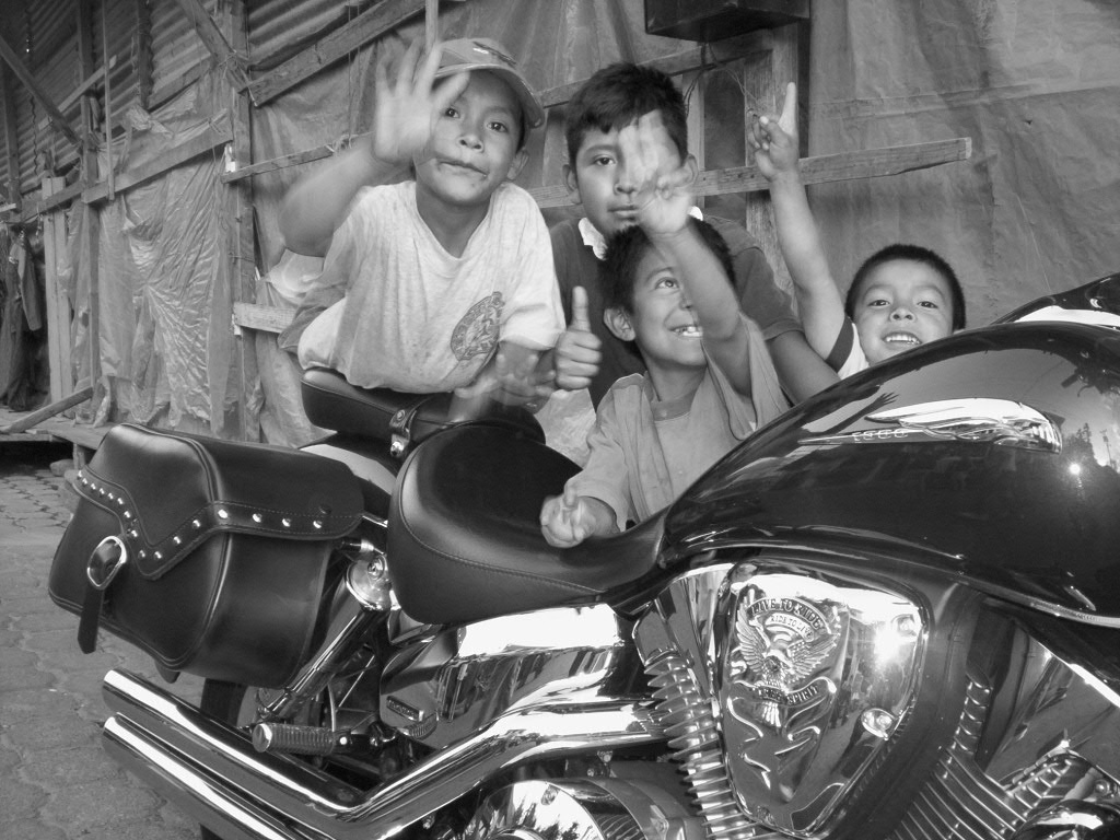 un grupo de niños en la Calle Santander de Panajachel, Sololá, Guatemala.